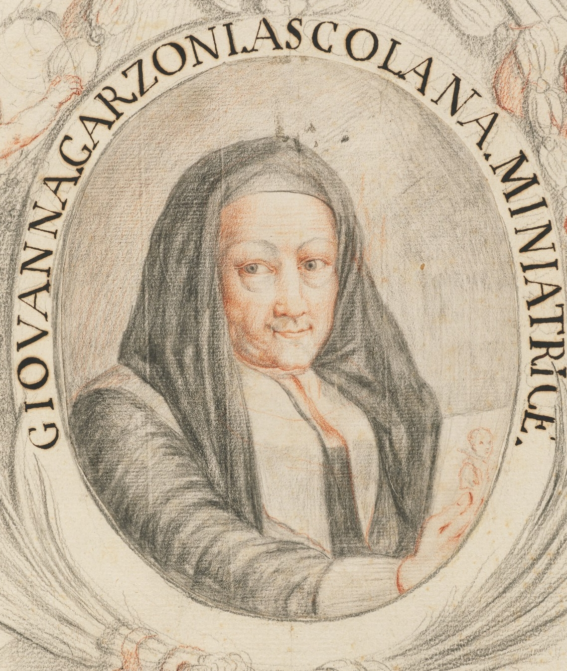 Giovanna Garzoni self-portrait